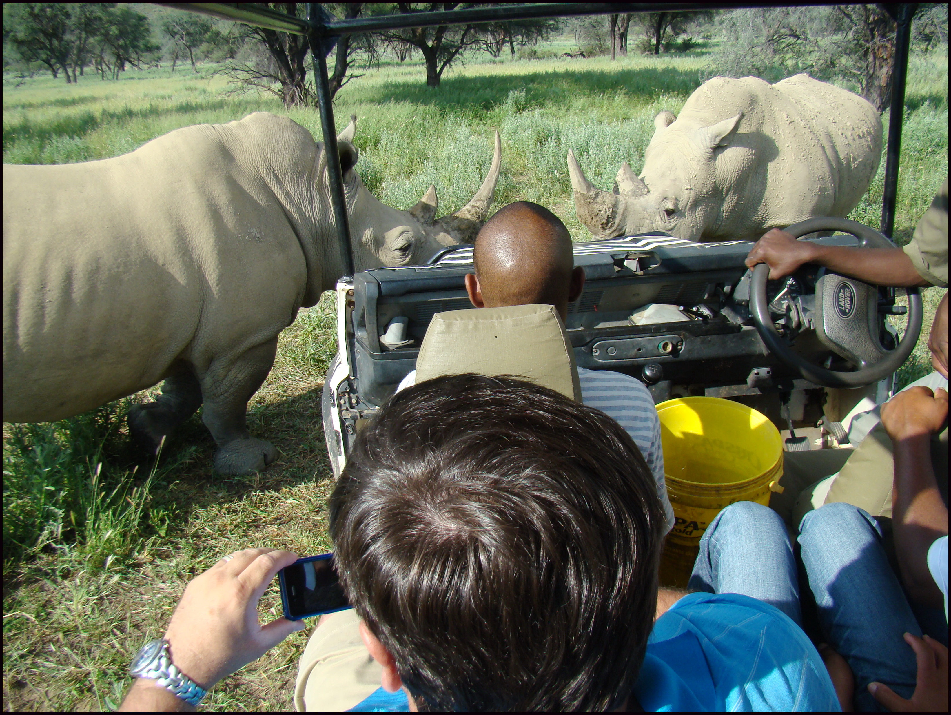 На фотосафари. Носороги и здесь борятся за любовь. Март, 2012.